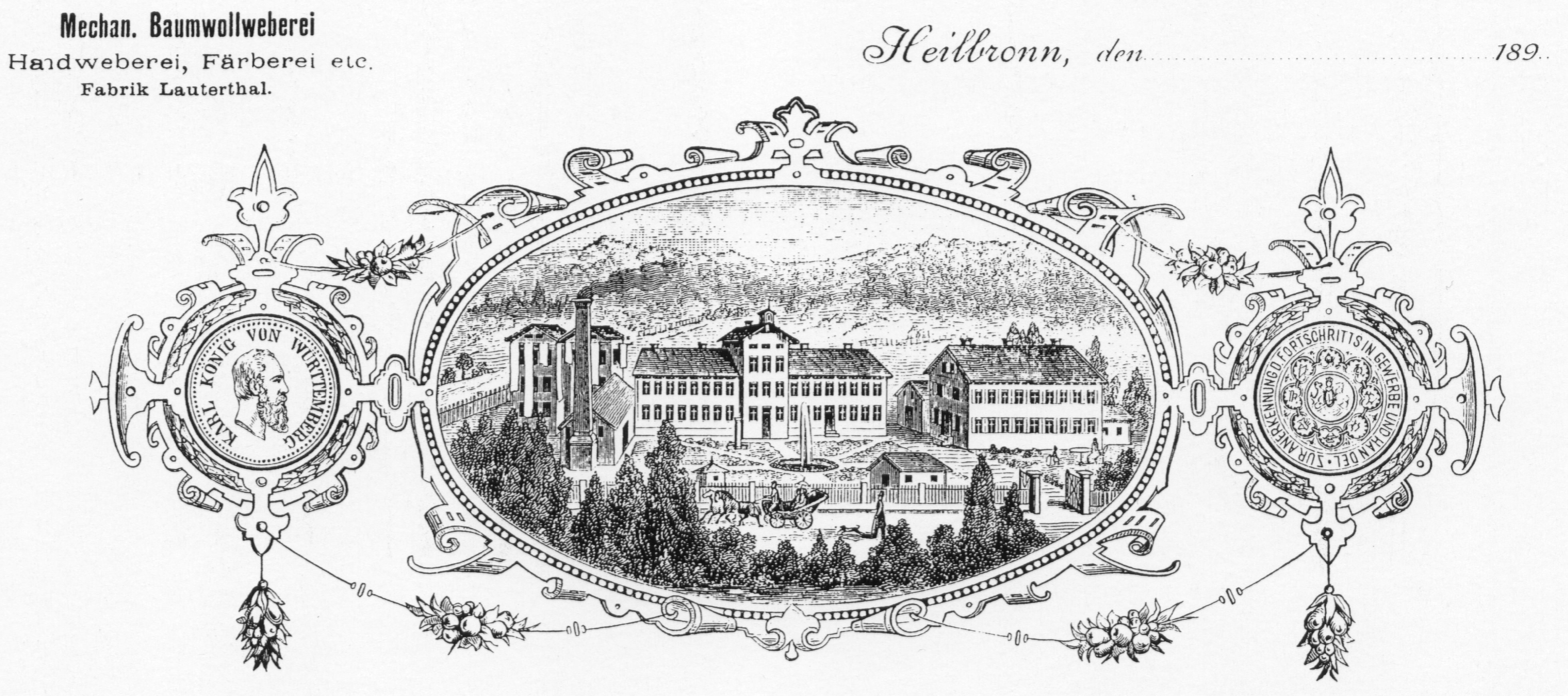 Briefkopf der Mechanischen Baumwollweberei der Gebrüder Pilger, Heilbronn, mit Ansicht der Fabrik Lauterthal in Neulautern, heute Gemeinde Wüstenrot